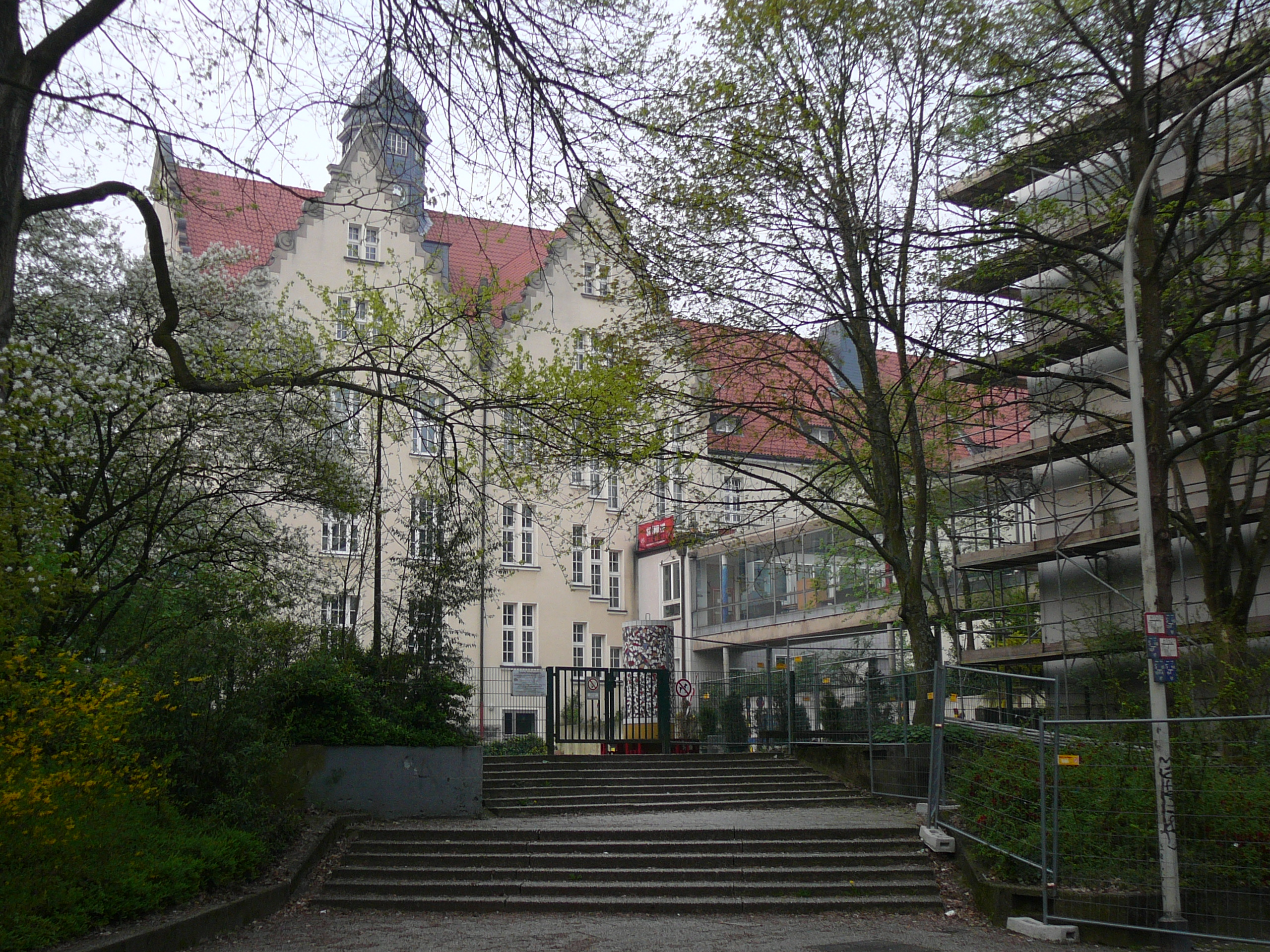 Beethovenstraße, Wuppertal